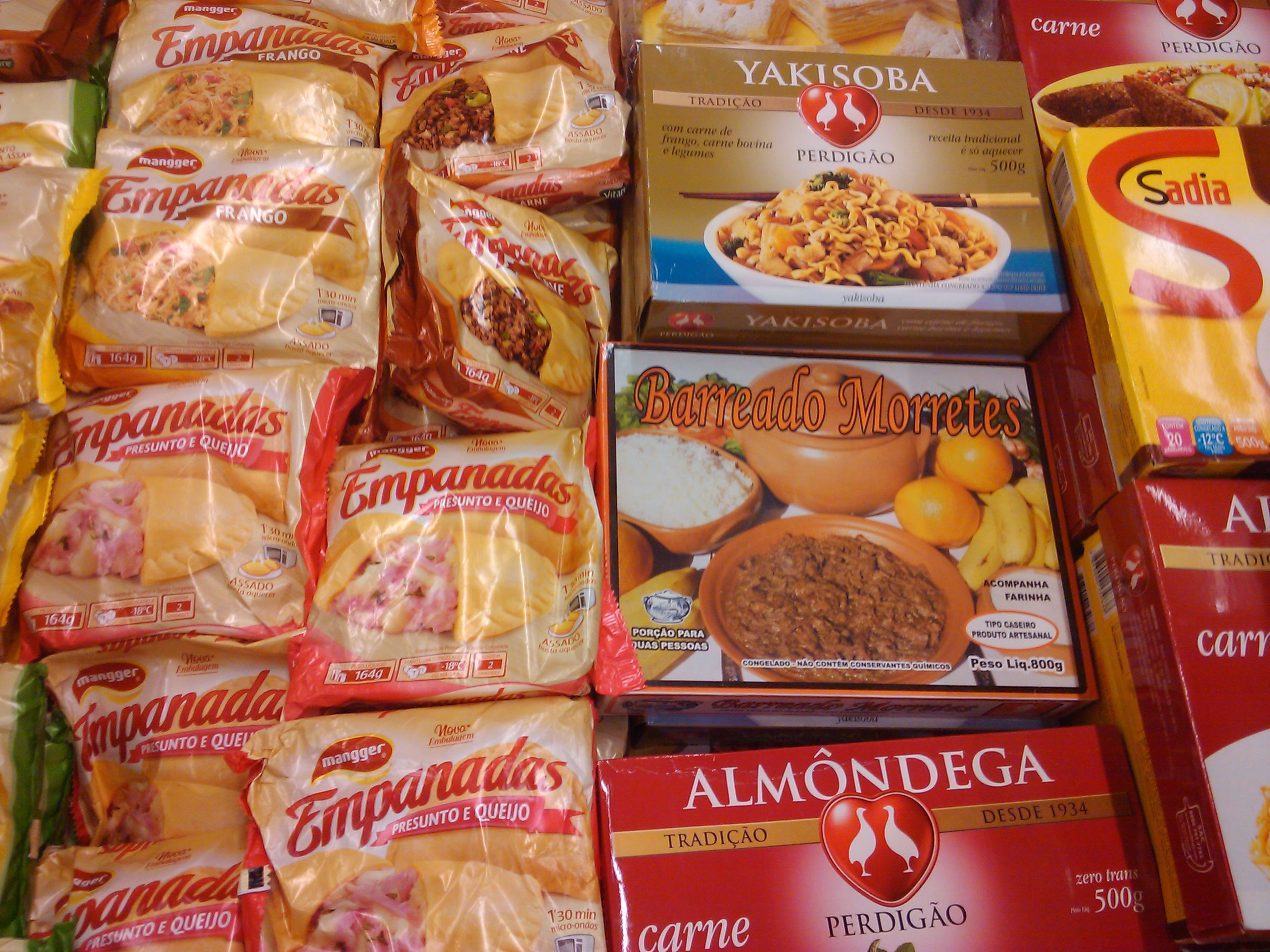 Supermercado Mercadorama, Batel, Curitiba, PR